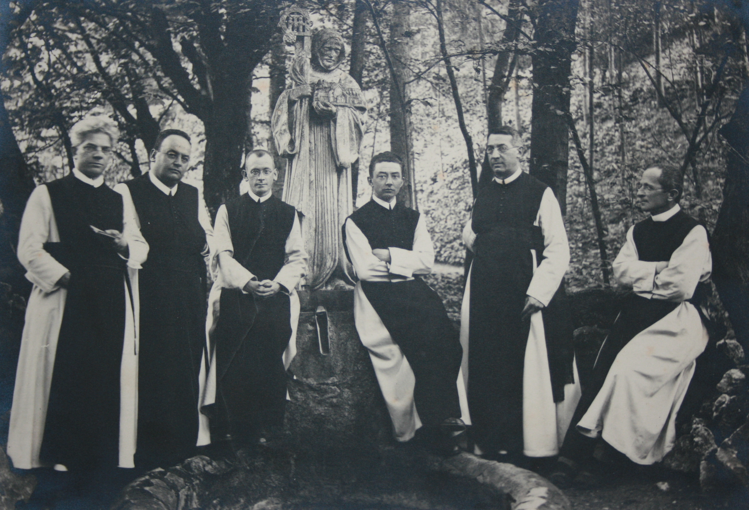 Der heutige Philosophisch-Theologische Hochschule Benedikt XVI. Heiligenkreuz, Professorenkollegium ca 1930.